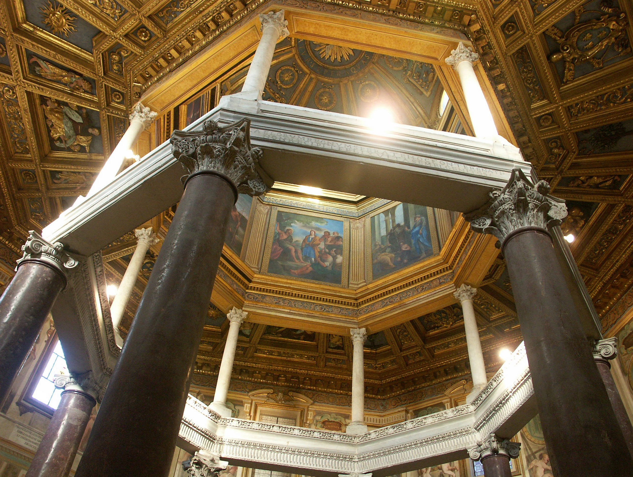 Rom, San Giovanni in Lateran, Oktogone "Kuppel" des Baptisteriums